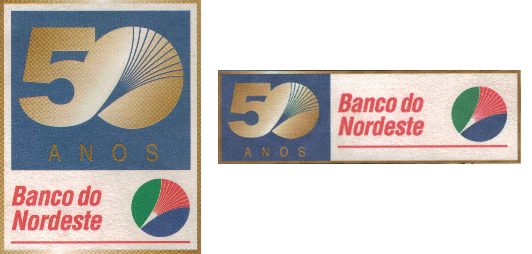 Logomarca dos 50 anos do Banco do Nordeste do Brasil.